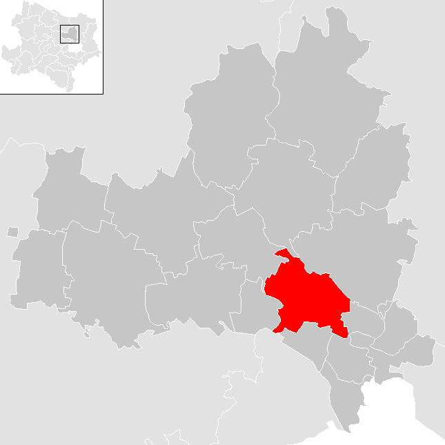 Bezirk Korneuburg